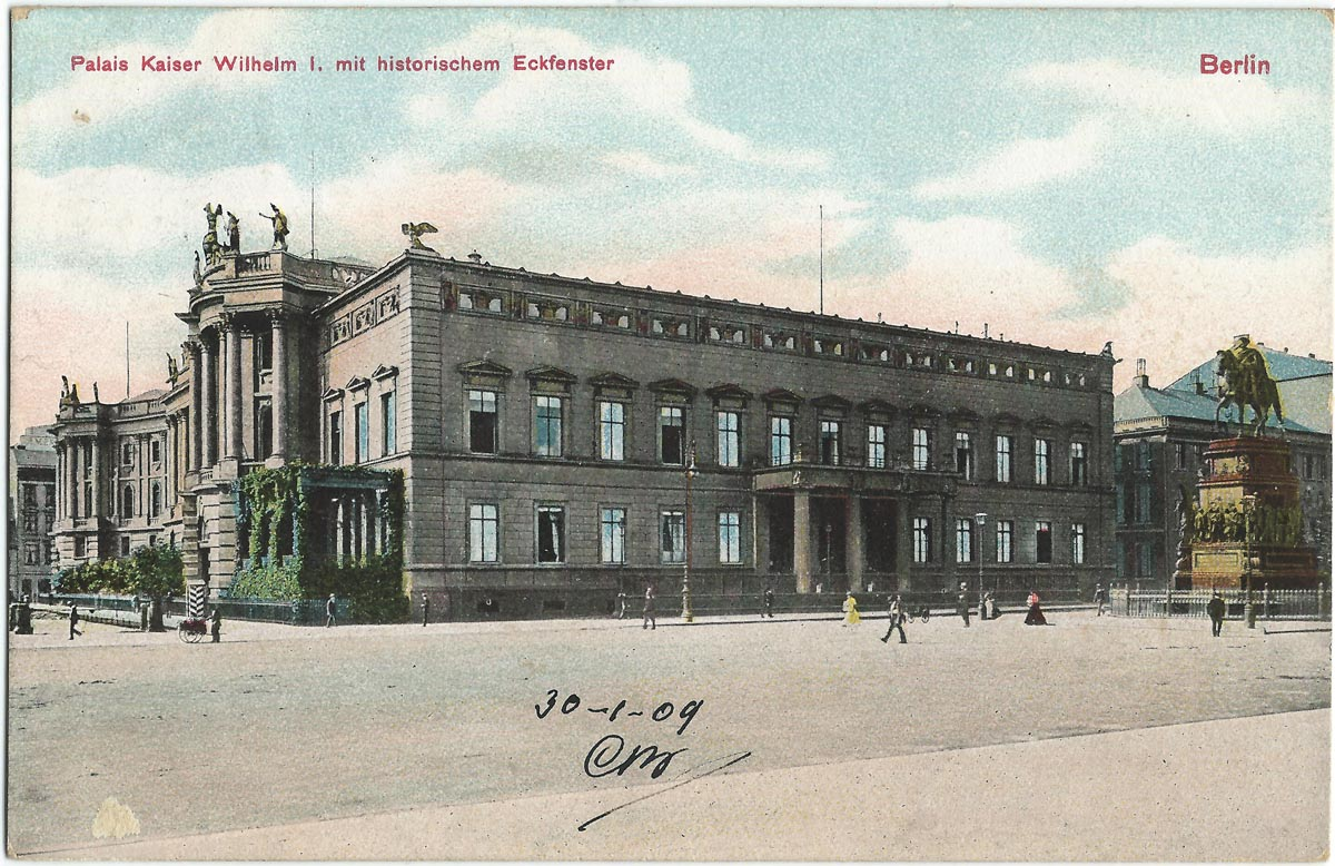 Vue de Berlin au début du XXe siècle (carte postale).